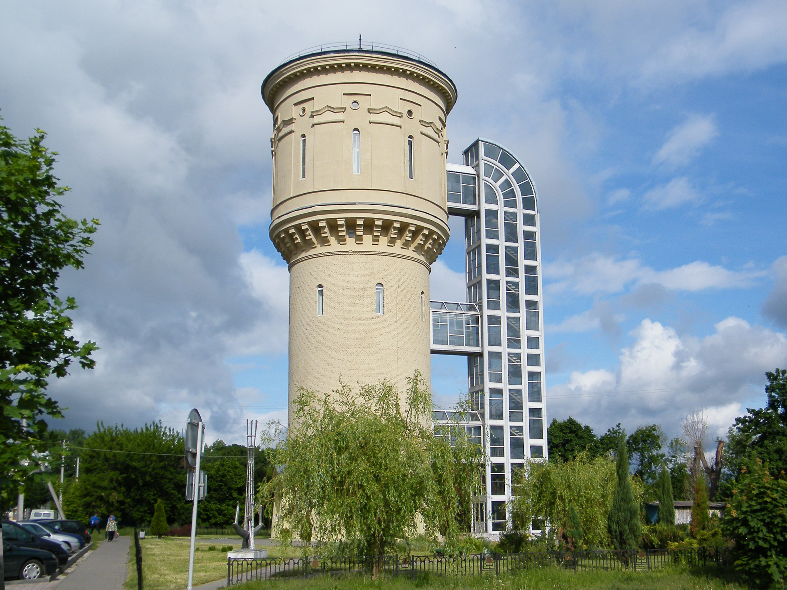 Природно-экологический музей